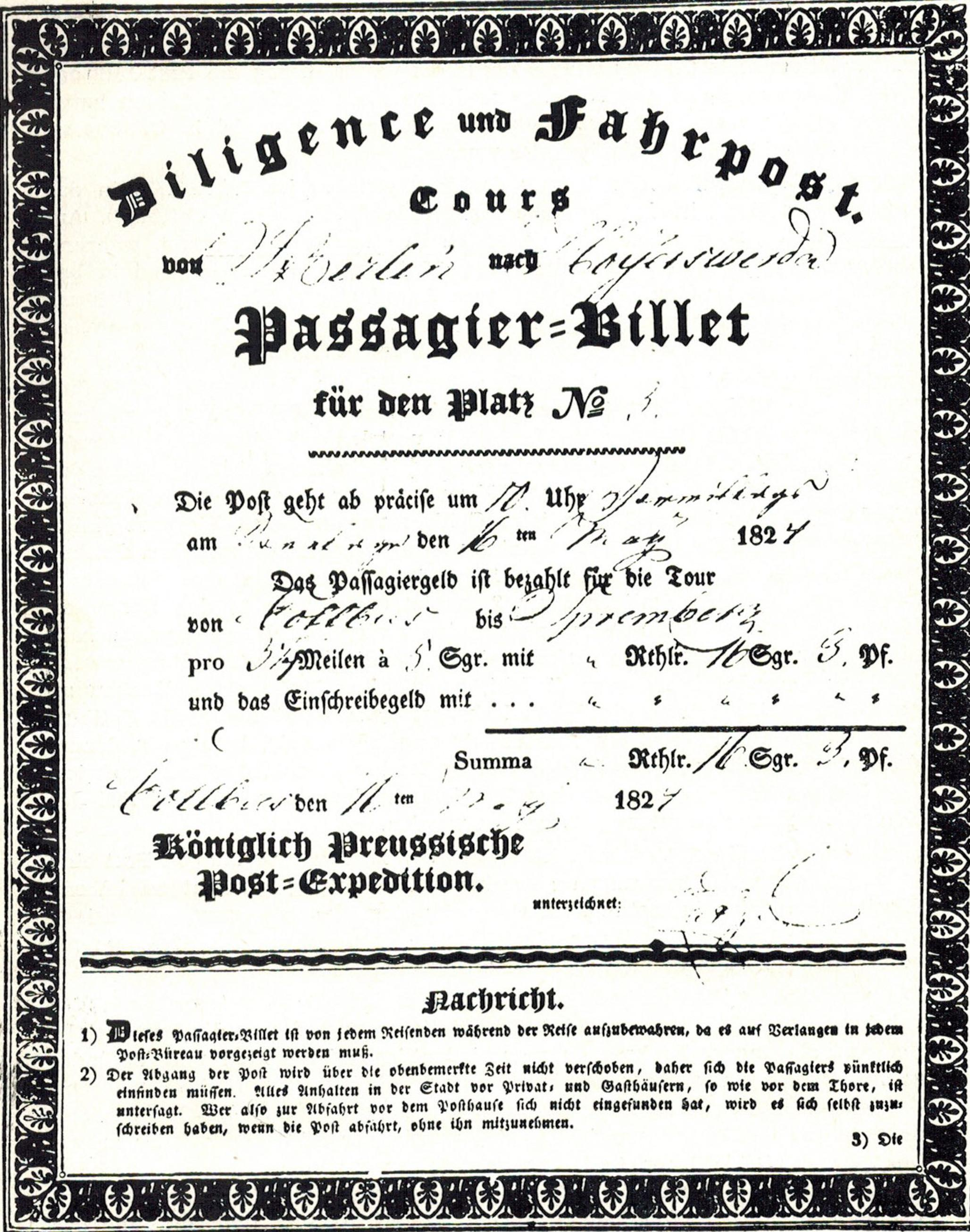 Fahrpost